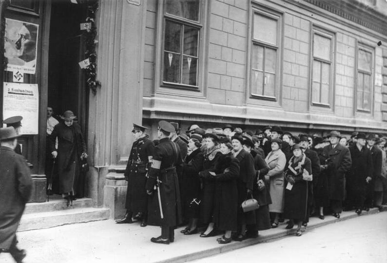 Wien wählt. Schon in den frühen Morgenstunden standen in Wien, der Hauptstadt der Deutschen Ostmark, lange Menschenschlangen in den Wahllokalen, um für Grossdeutschland ihre Stimme abzugeben.